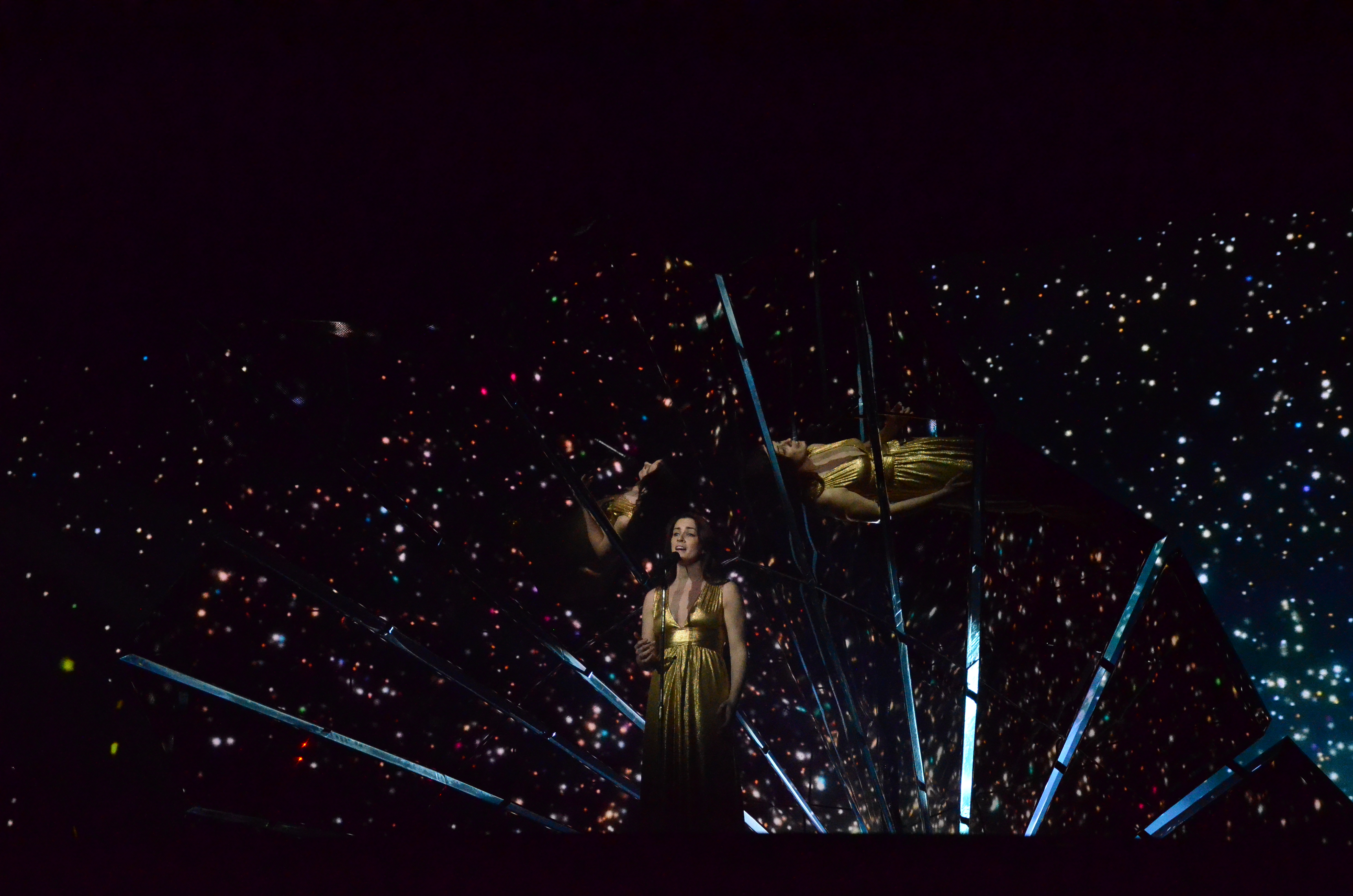 12 травня. Генеральна репетиція фіналу Євробачення 2017. Lucie Jones (United Kingdom).